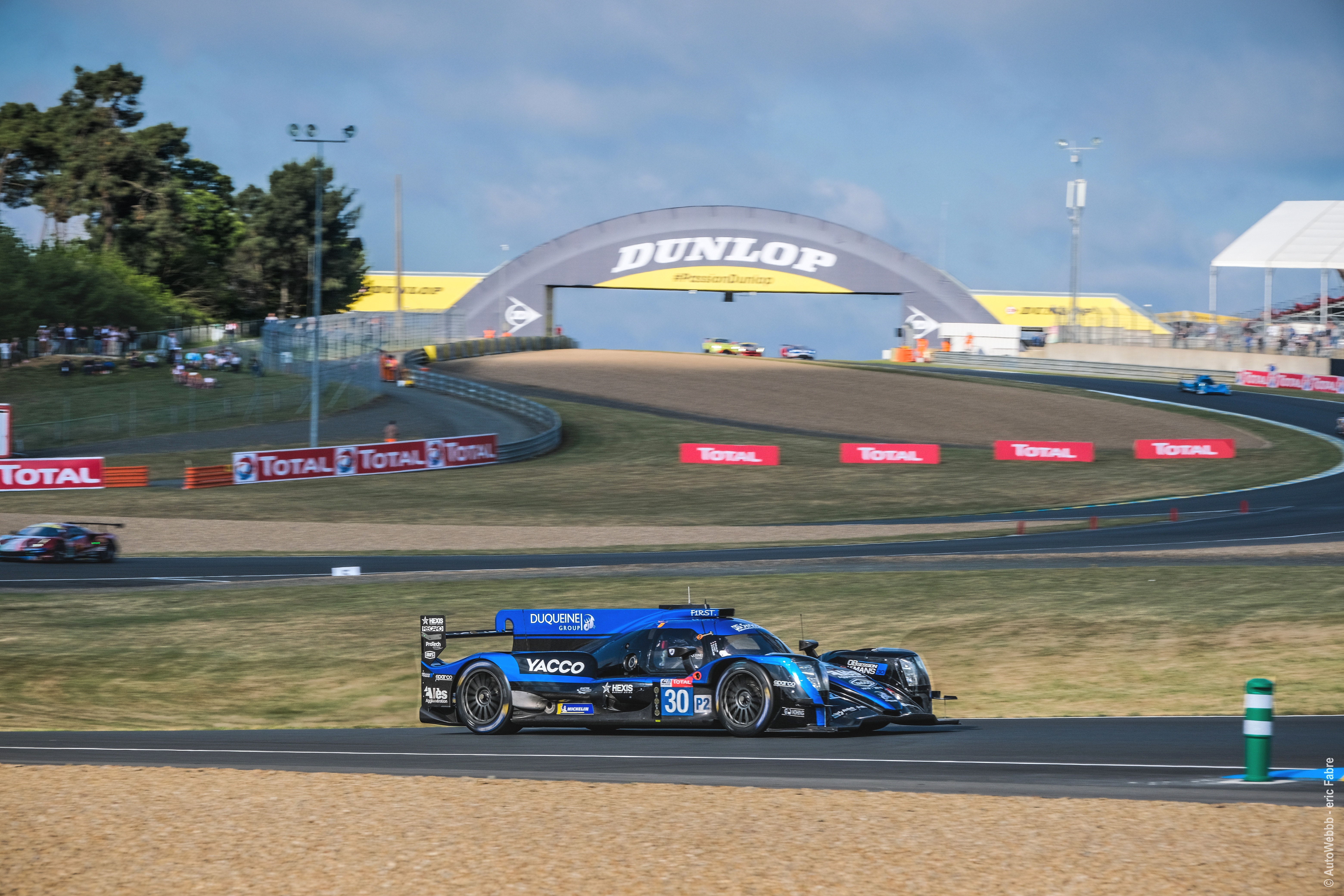 DUQUEINE Team sur le Circuit des 24 Heures